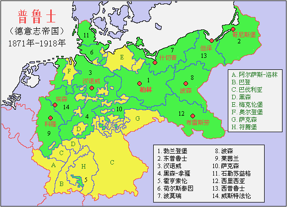 德意志帝国的普鲁士。我把原图的地名翻译了。